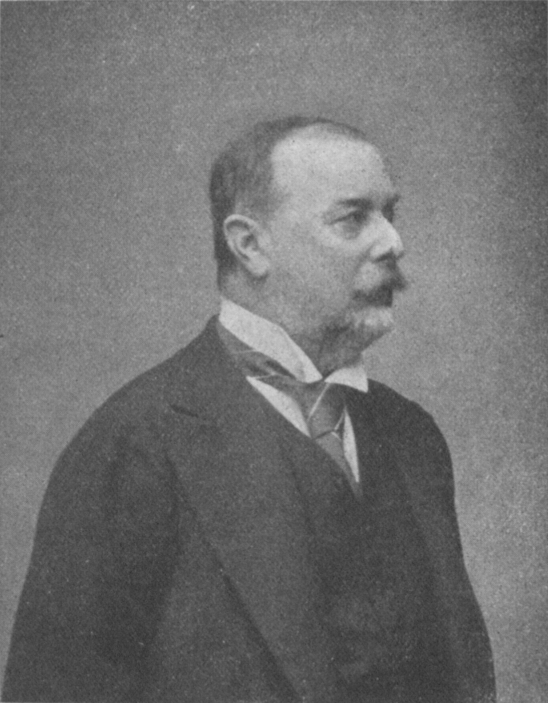 Graf Béla Széchenyi von Sárvár-Felsővidék (1837–1918), Hungarian explorer and politician